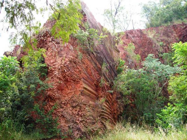 Cerro Koi, Aregua, Paraguay